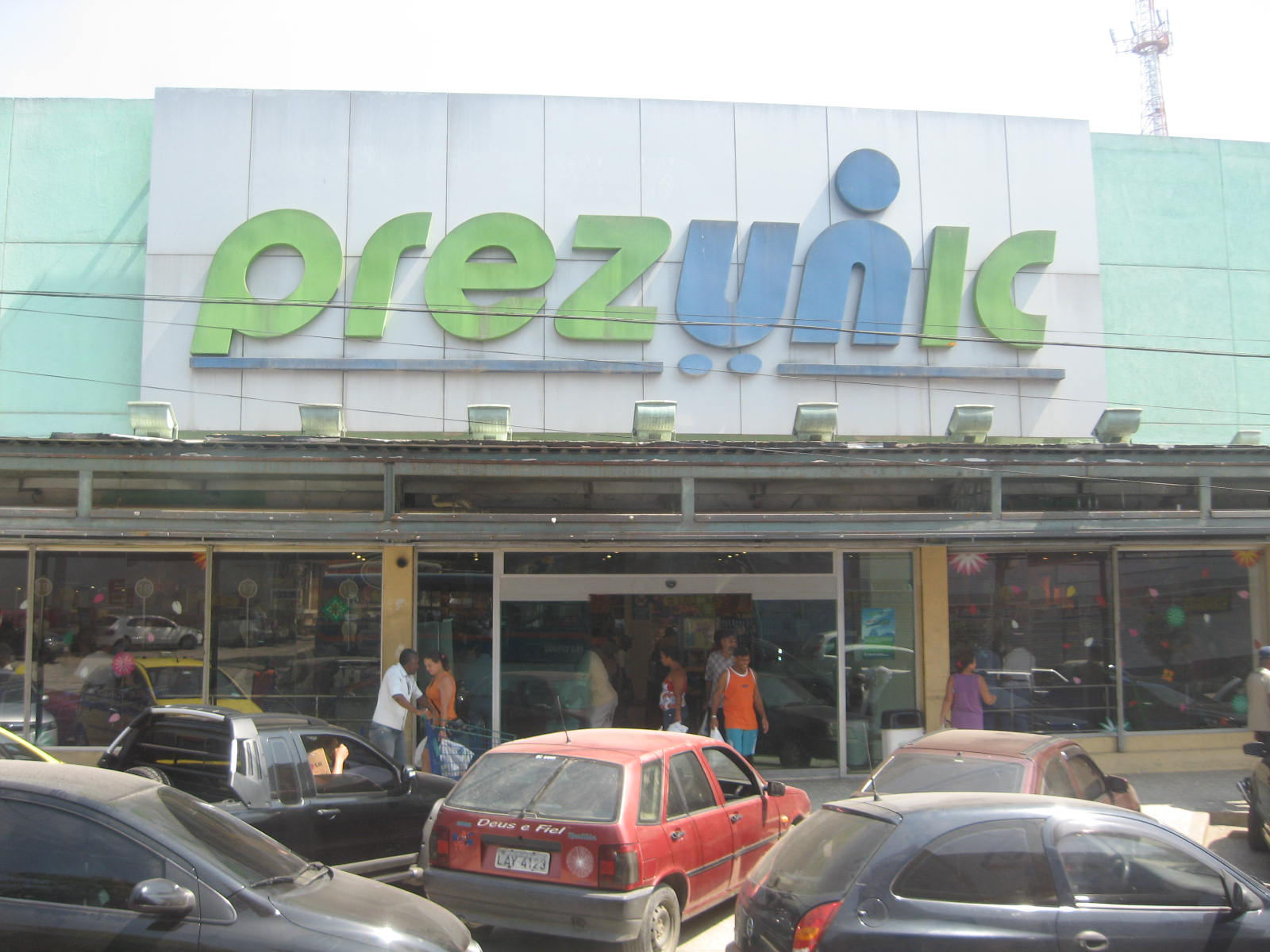 Prezunic supermercados, unidade em Coelho da Rocha, São João de Meriti, RJ.